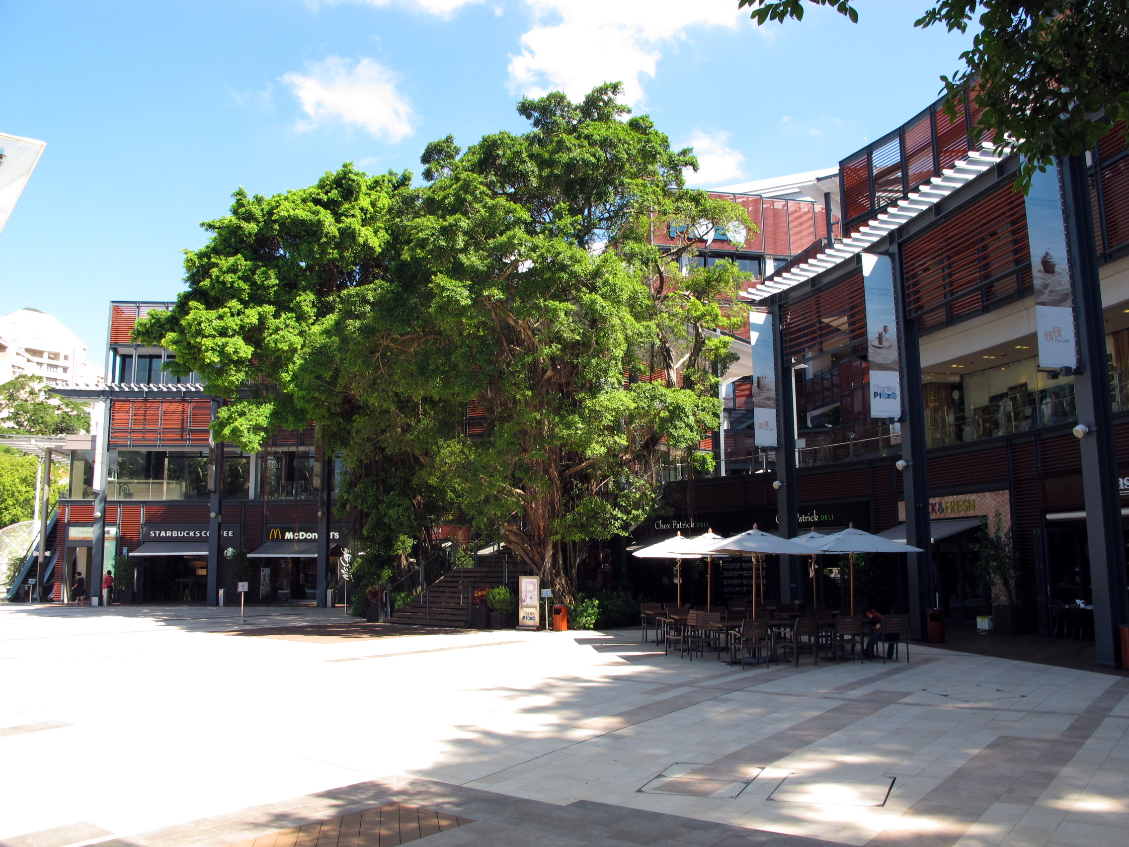 Stanley Plaza